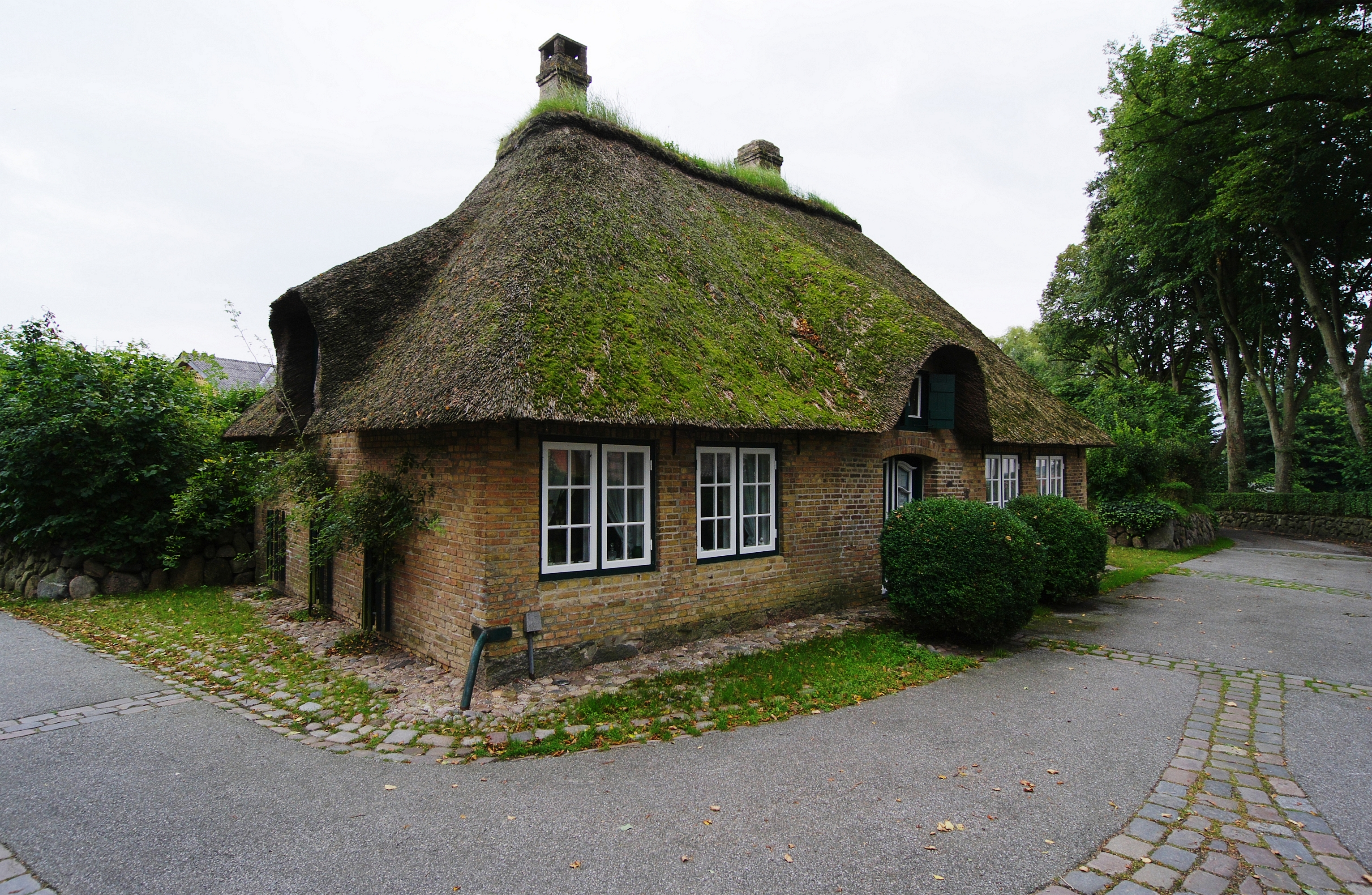 Haus in Schwabstedt.